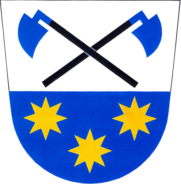 Znak obce Sulimov